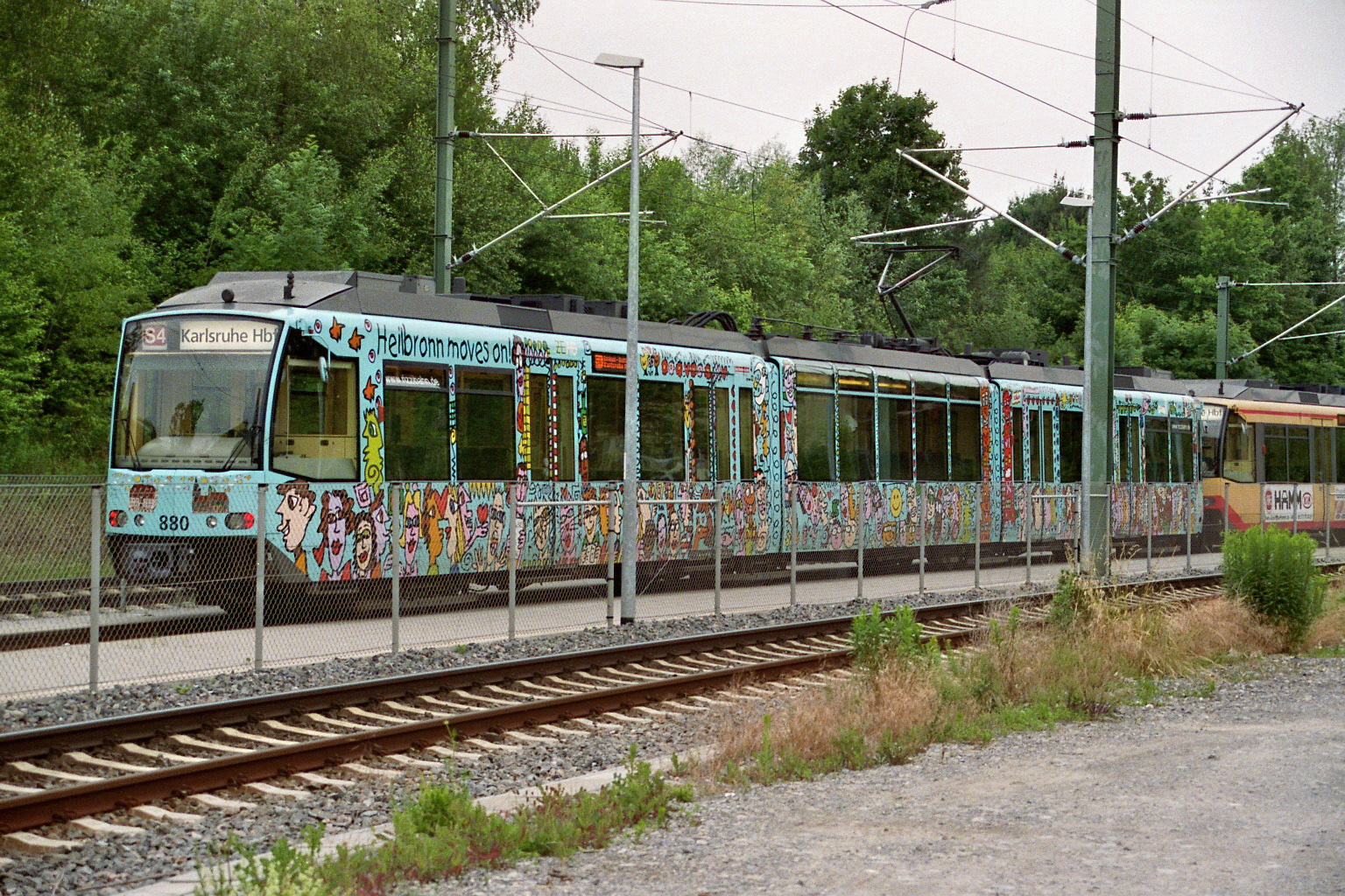 Stadtbahn auf dem Abstellgleis im Bf Weinsberg, wurde für die Rückfahrt nach Karlsruhe vorbereitet.